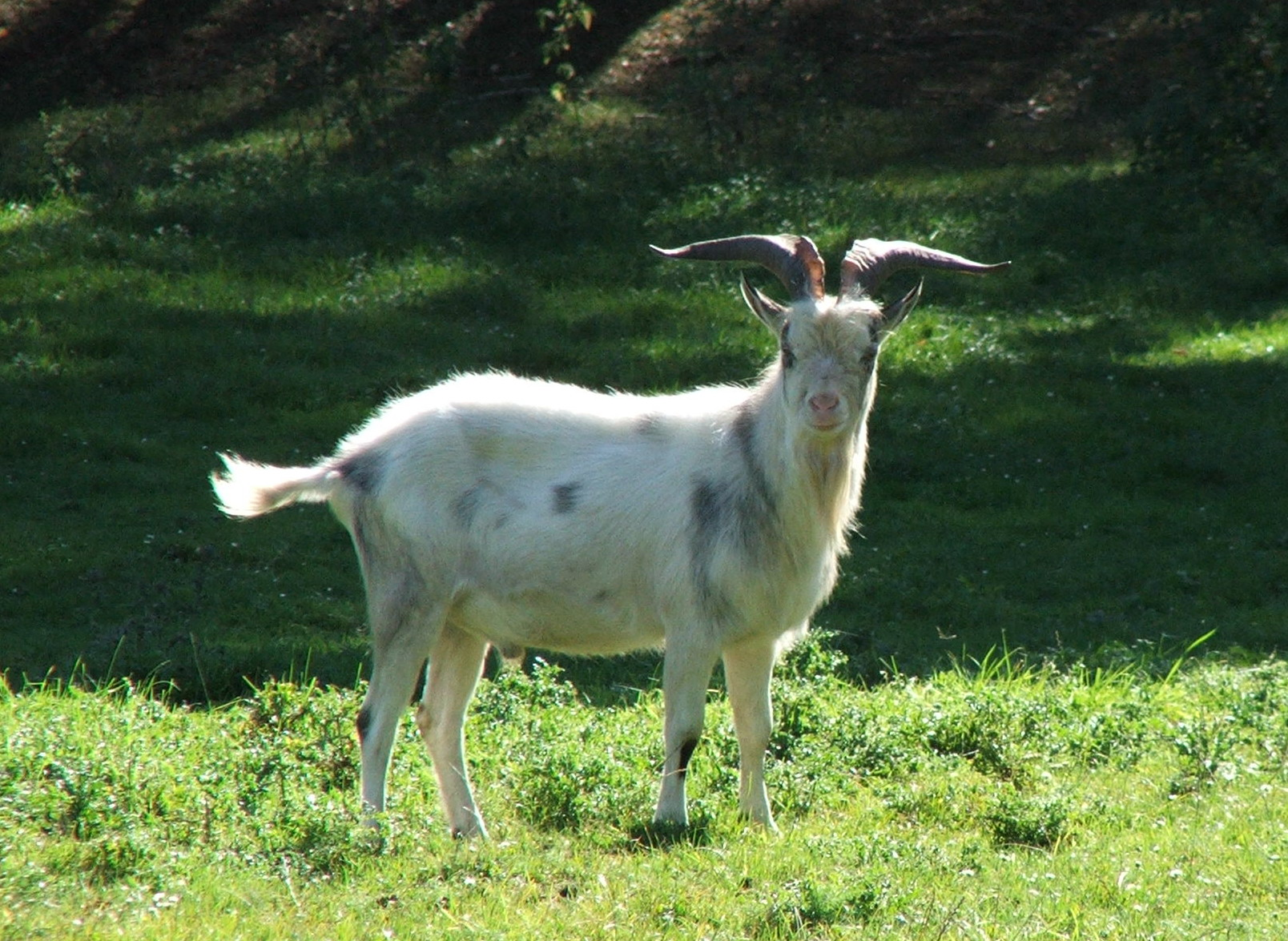 "Kozioł (stary cap!) - by Selena."